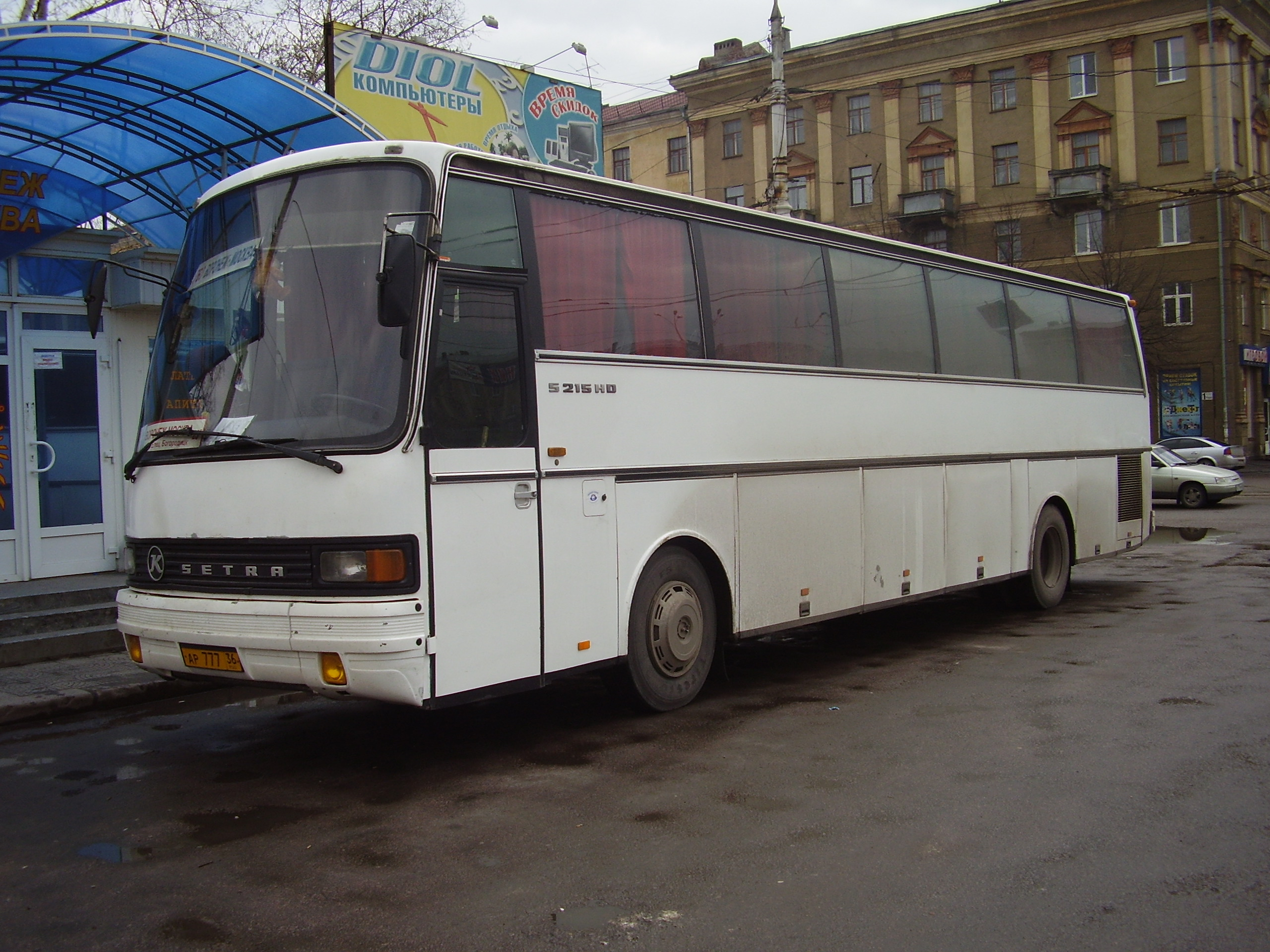 Автобус Setra_S215HD сообщением Воронеж--Москва - Bus Setra_S215HD Voroneg-Moskva